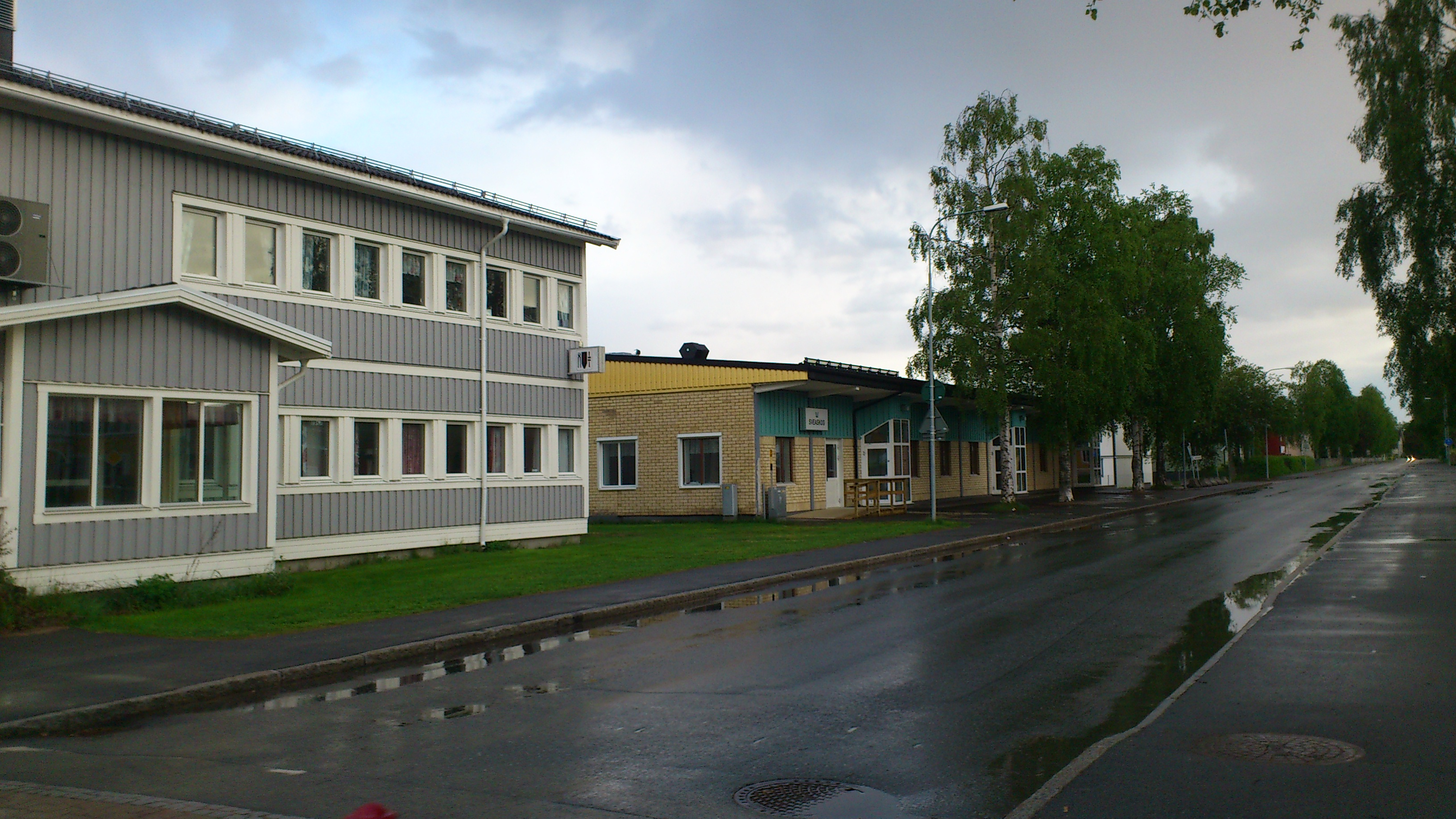 Sett från torget, Fjällvägen